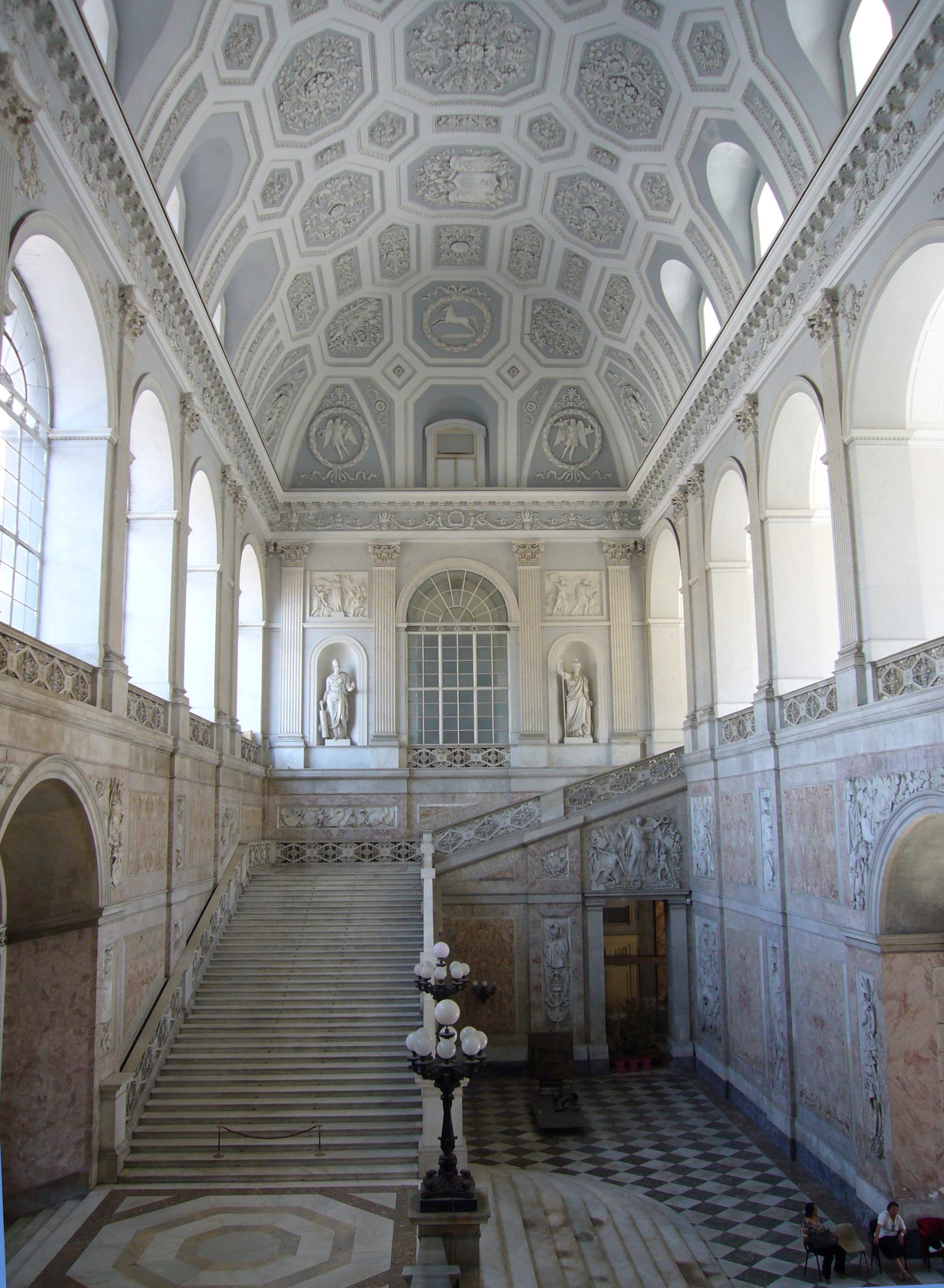 Palazzo Reale a Napoli: ingresso e scalone destro